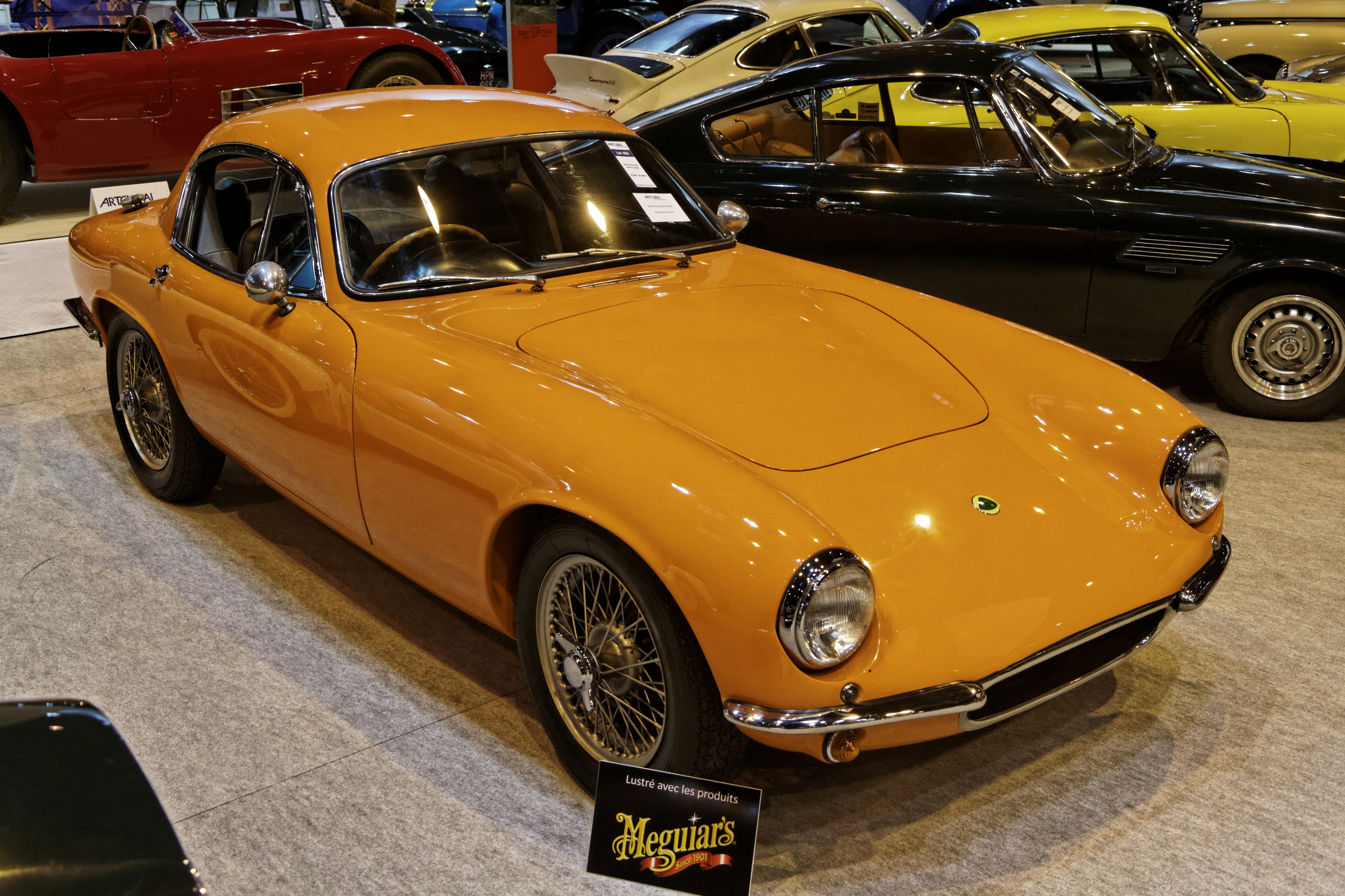 Une Lotus Elite série 2 coupé exposée lors du salon Retromobile 2014